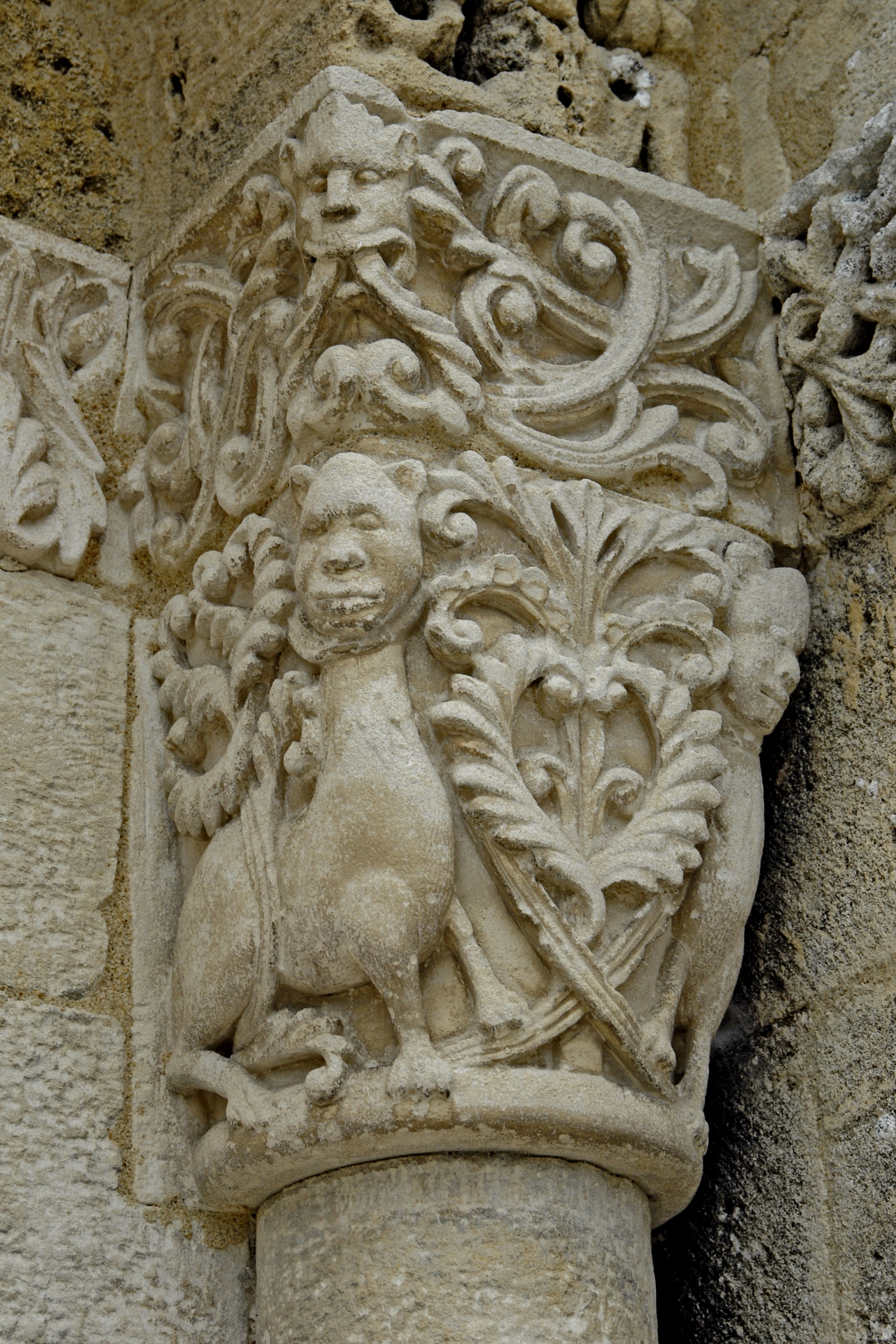 Notre-Dame Corme-Écluse,Kapitelle, rechtes Scheinportal rechts